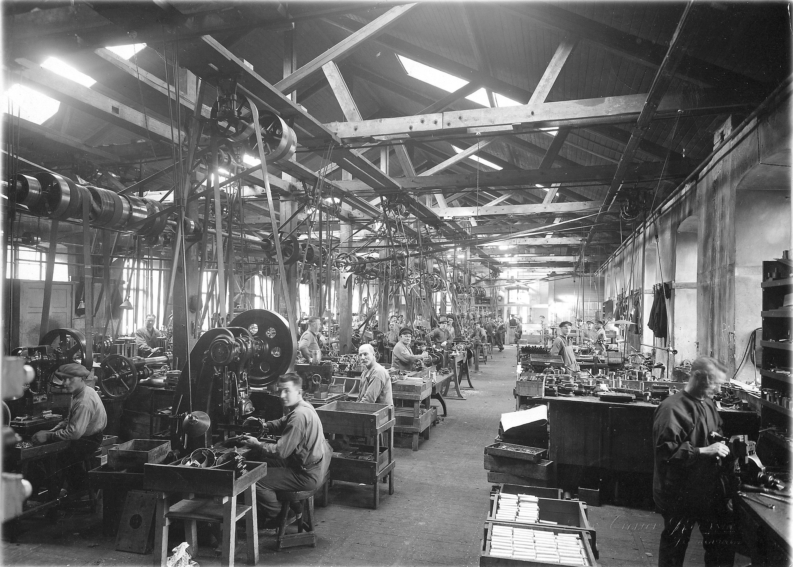 Stensholms fabriks maskinverkstad 1934